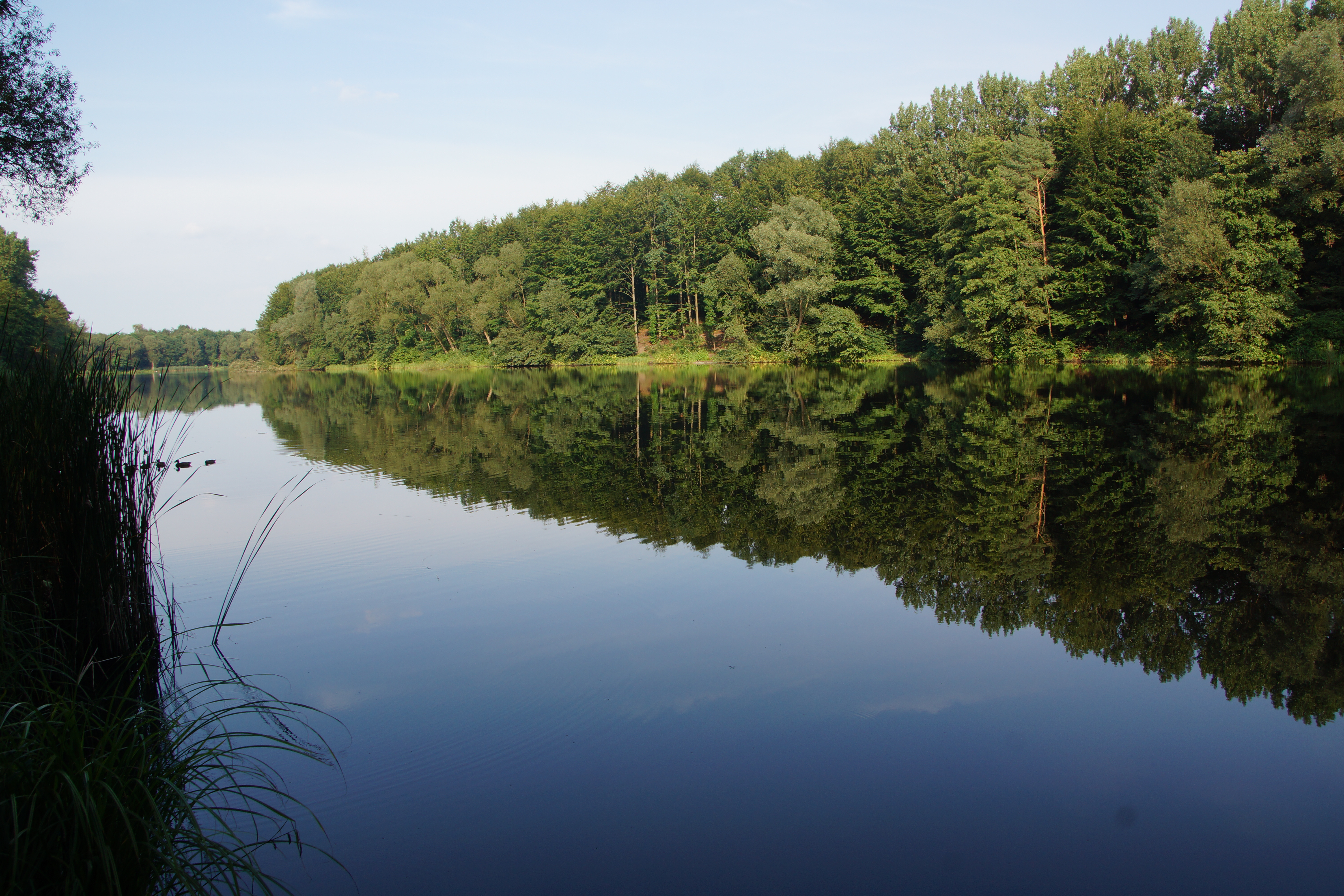 Gotteshülfeteich (auch Gotteshülfesee) in Hürth-Berrenrath